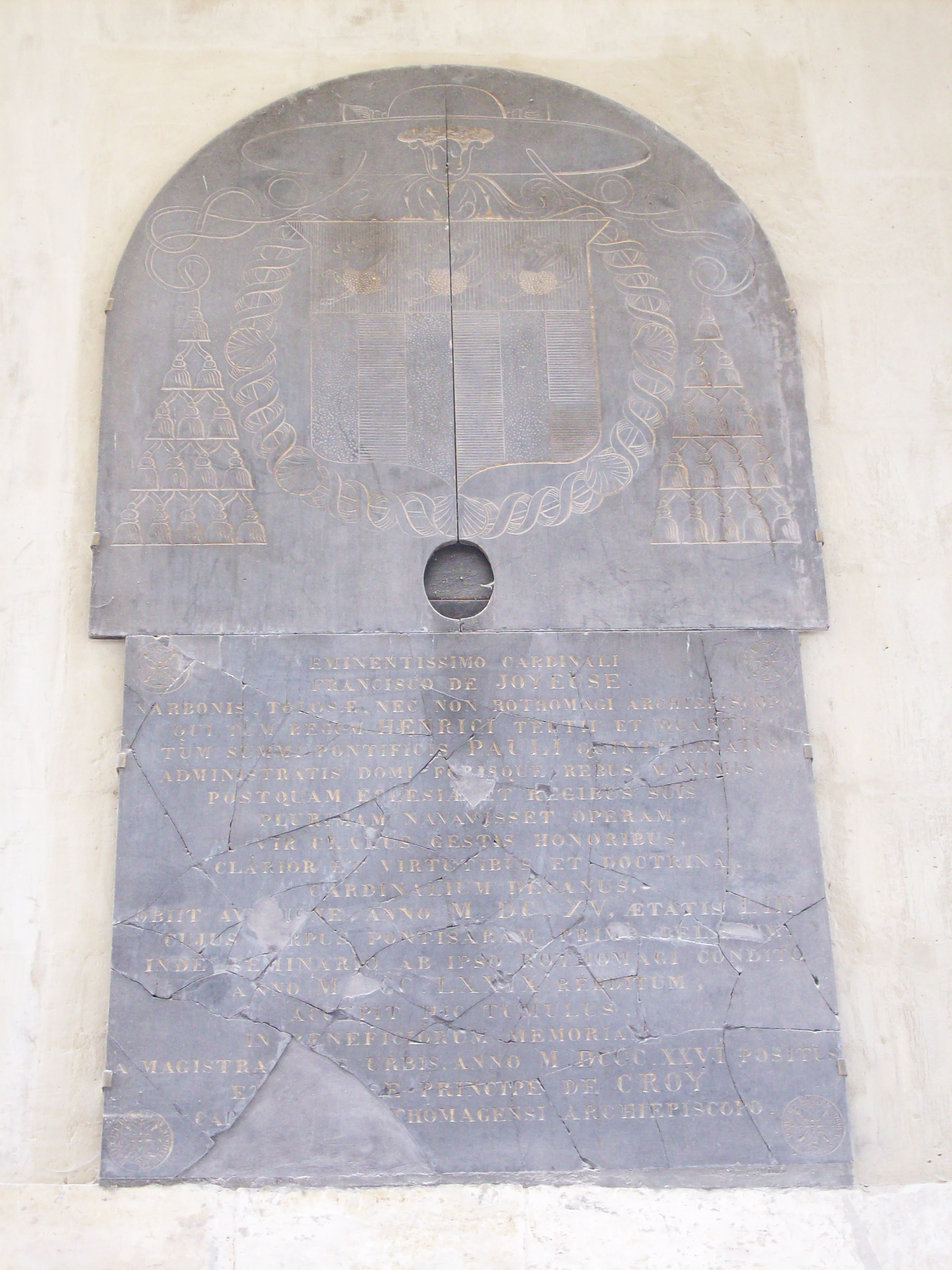 Epitaphe du cardinal de Joyeuse: "EMINENTISSIMO CARDINALI FRANCISCO DE JOYEUSE NARBONIS, TOLOSE, NEC NON ROTHOMAGI ARCHIEPISCOP QUI TUM REG(...) HENRICI TECTII ET QUARTI TUM SUMMI PONTIFICIS PAULI QUINT LEGATUS ADMINISTRATIS DOMI FORISQUE REBUS MAXIMIS POSTQUAM ECLESIA ET REGIBUS SUIS PLURIMAM NAVAVISSET OPERAM VIR CLARUS GESTIS HONORIBUS CLARIOR ET VIRTUTIBUS ET DOCTRINA CARDINALIUM DECANUS OBIIT AV(...)NE ANNO M.DC.XV AETATIS LIII CUJUS (...)RPUS PONTISARAM PRIMO DEL(...) INDE SEMINARIO AB IPSO ROTHOMAGI CONDITO ANNO M.(...)CC.LXXIX REDDITUM ACCEPIT HIC TUMULUS IN BENEFICIORUM MEMORIA MAGISTRA (...) RUBIS ANNO M.DCCC.XXVI POSITUS E(...)E PRINCIPE DE CROY CA(...) ROTHOMAGENSI ARCHIEPISCOPO.